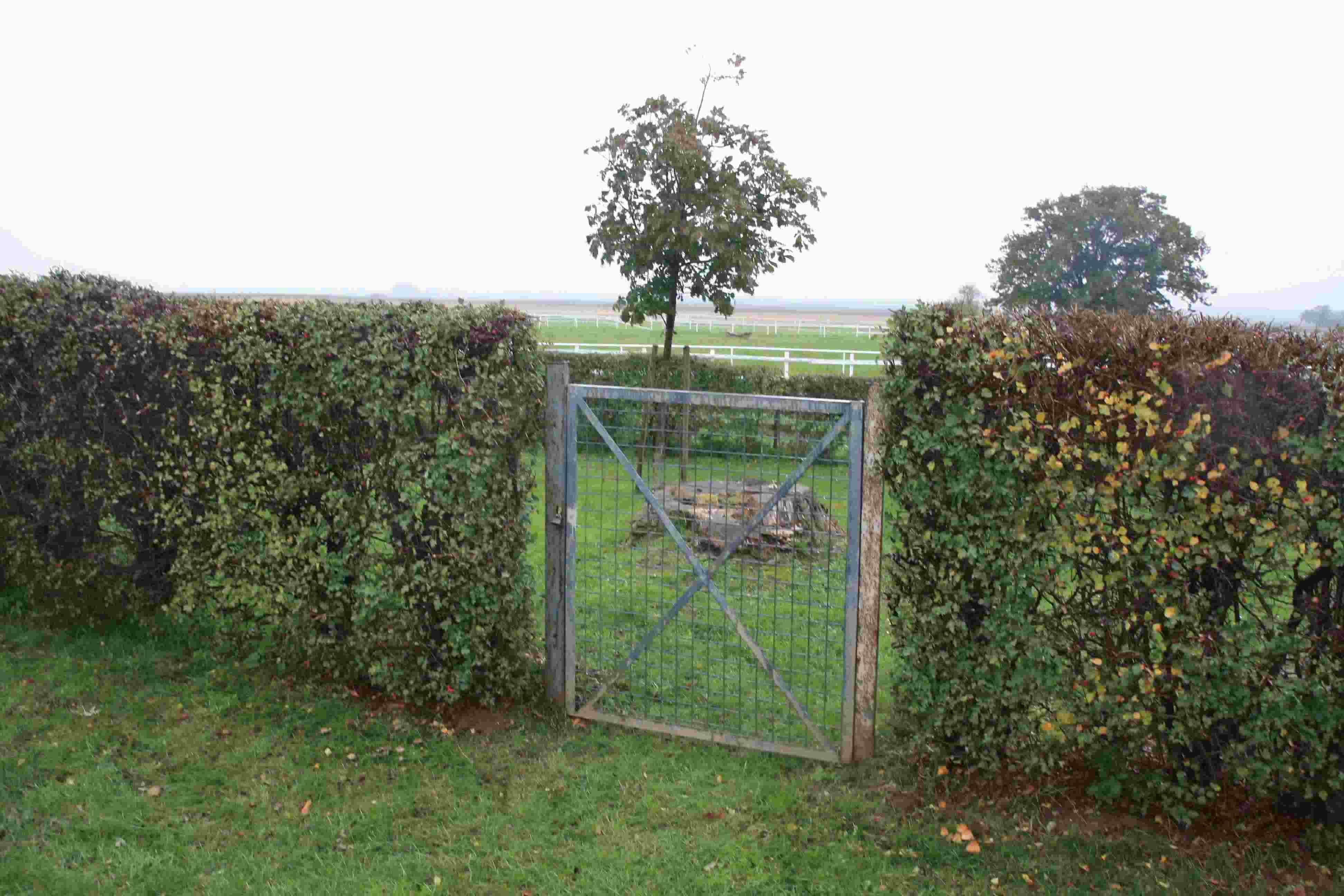 Der Eingang zum jüdischen Friedhof in Kelz im Kreis Düren